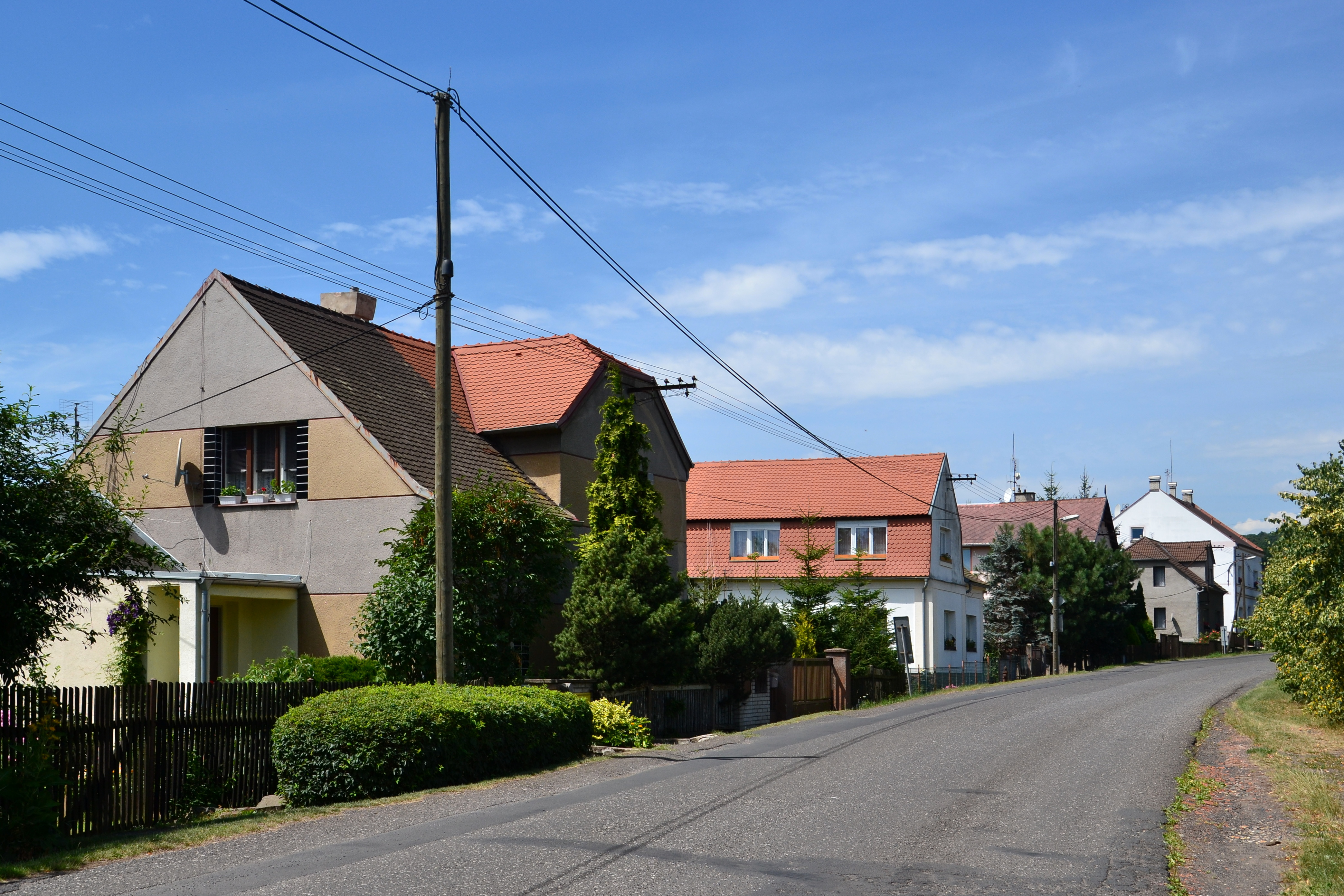 Ulice směrem ke Rtyni nad Bílinou